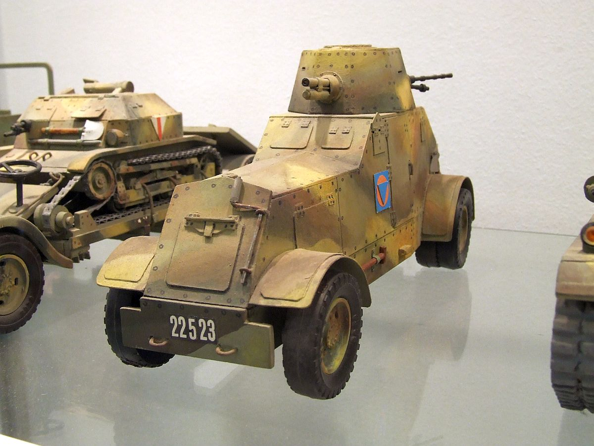 Samochód pancerny wz. 29, Muzeum techniki, Warszawa